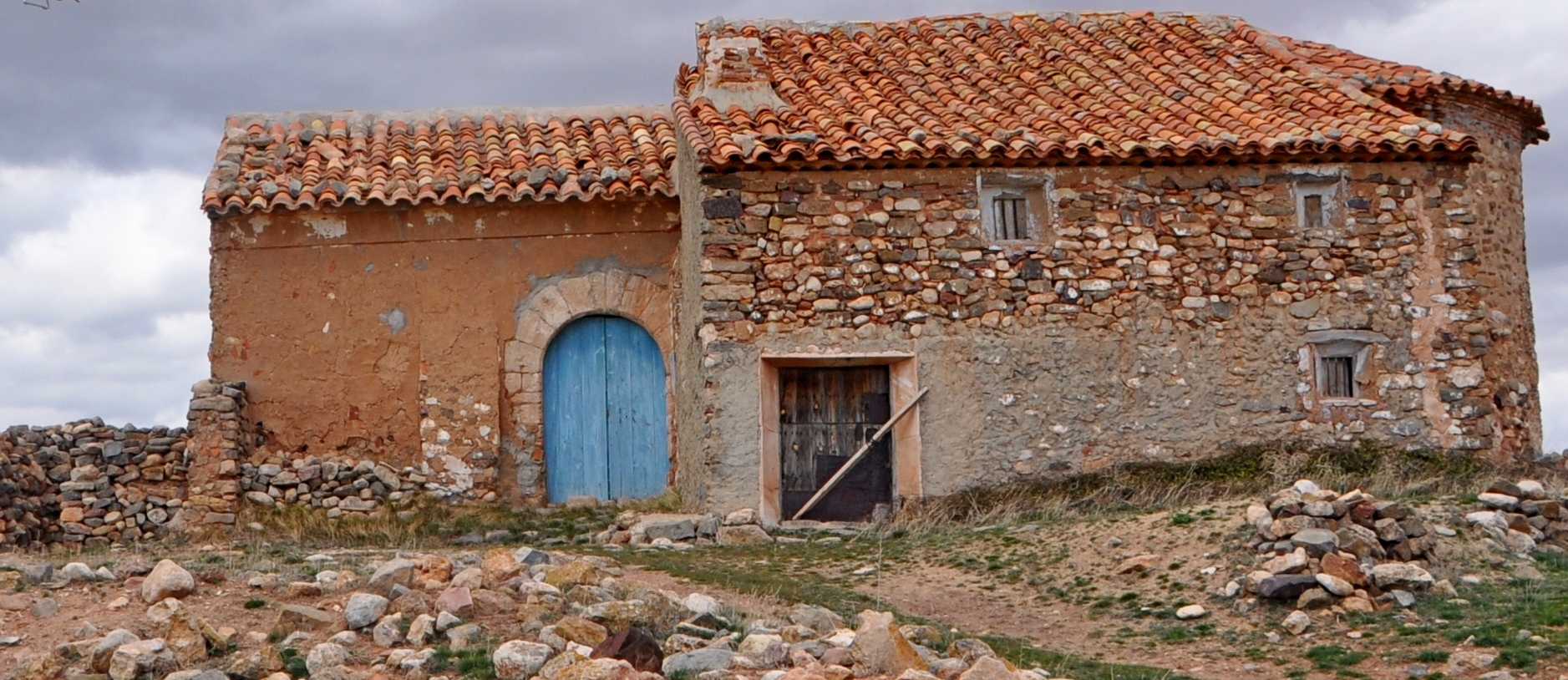 Ermita de San Miguel y casa del ermitaño de la Pardina del Mercadal